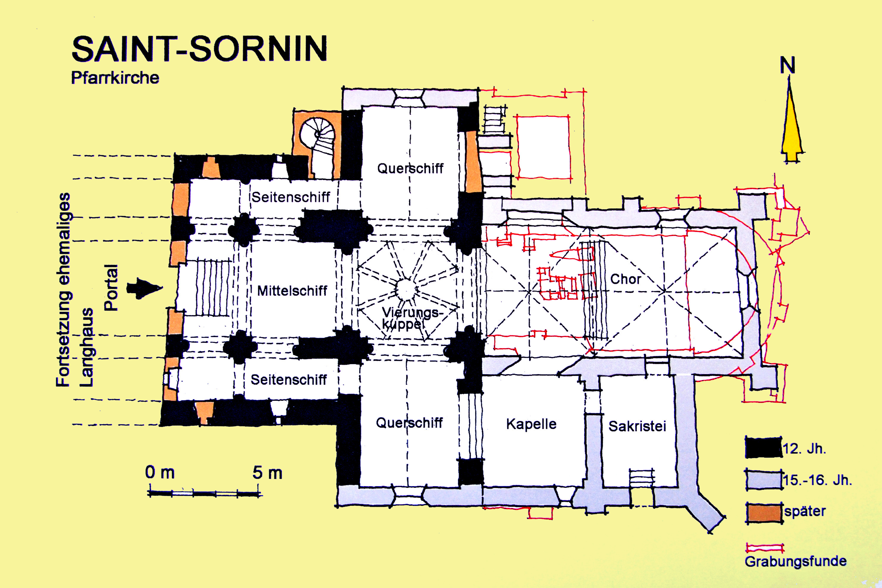 St-Sornin, Grundriss, Handskizze